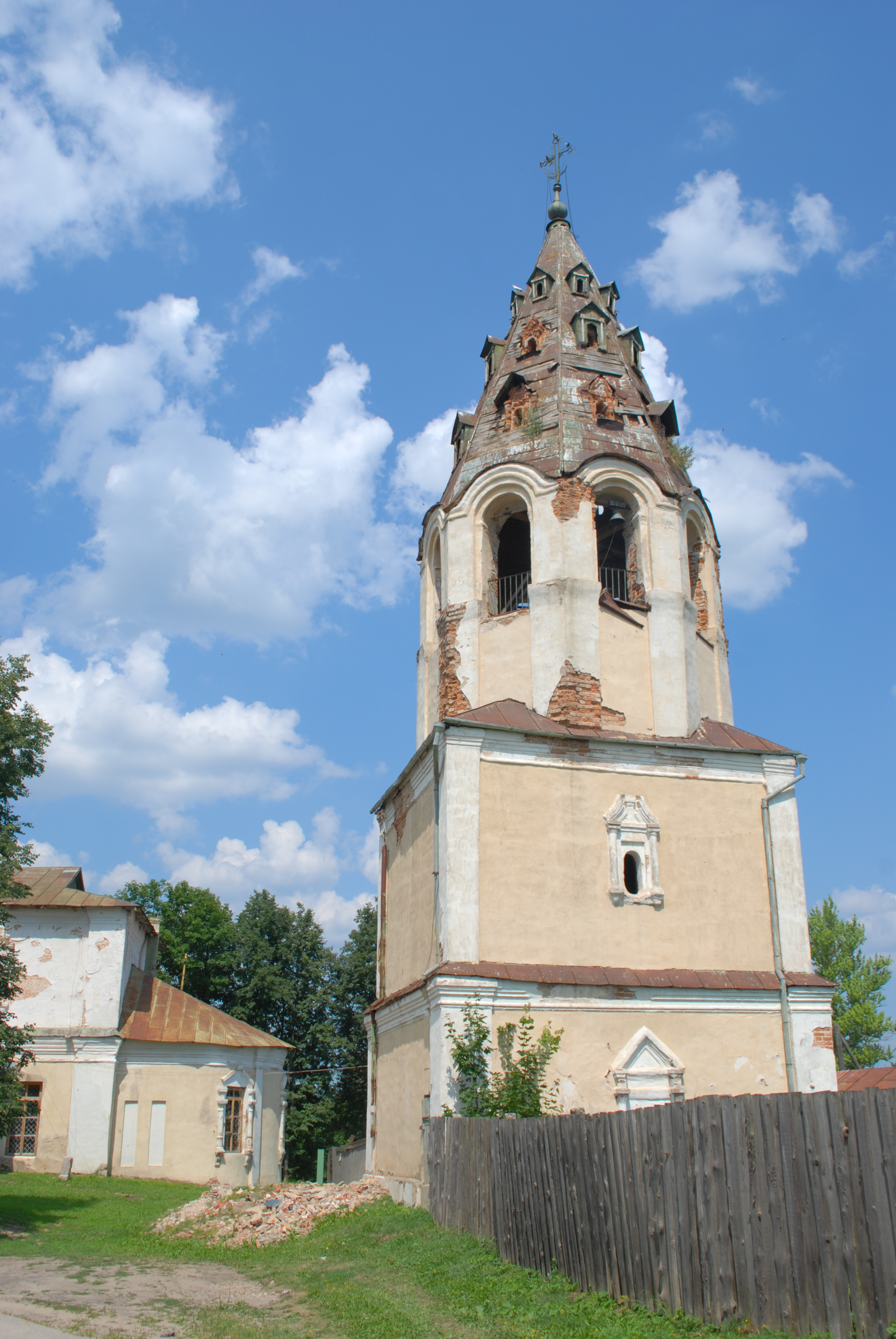 Благовещенская церковь (Калужская область, Мещовск, улица Энгельса, 4)